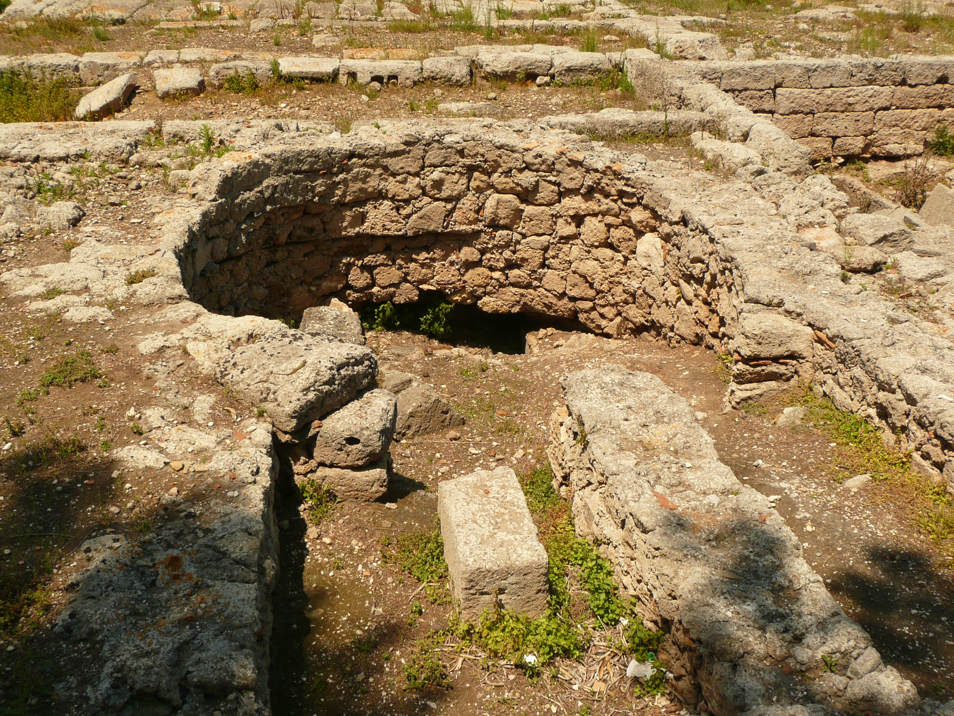 Parque arqueológico de Egnazia, Apulia.